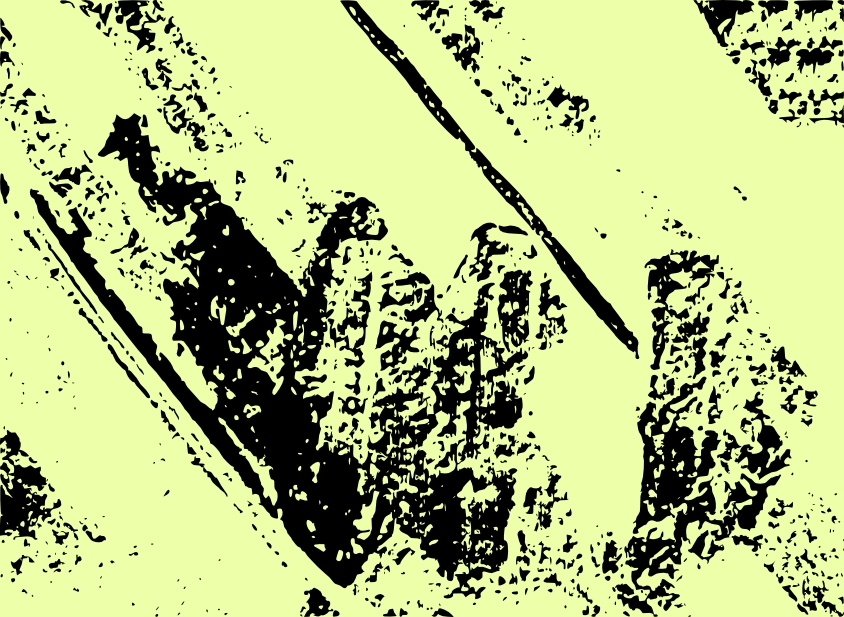 Urmele fostelor grajduri din Aruncuta," lichidate " in 1991 - prelucrare vectoriala a unei imagini de satelit din 2011